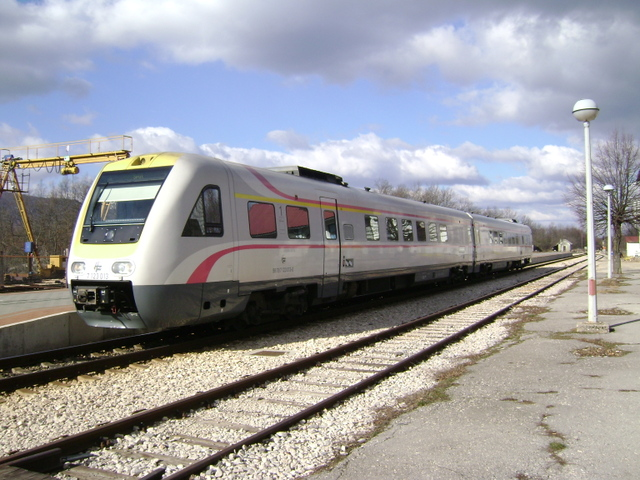 Nagibni u kolodvoru Gračac